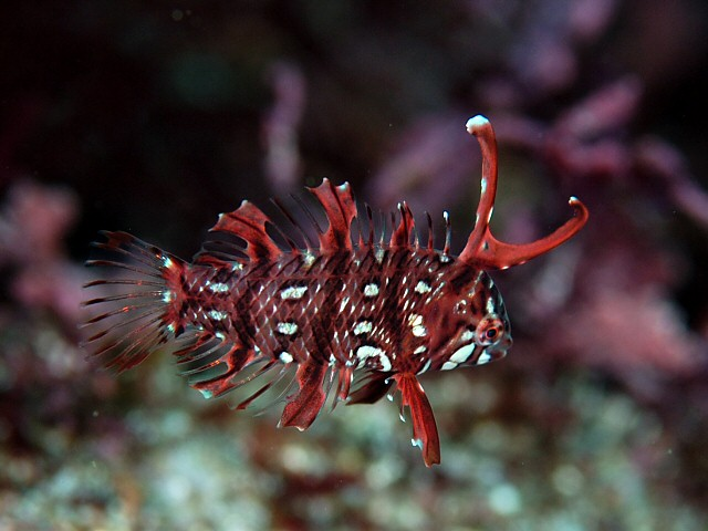 オビテンスモドキ Novaculichthys taeniourus